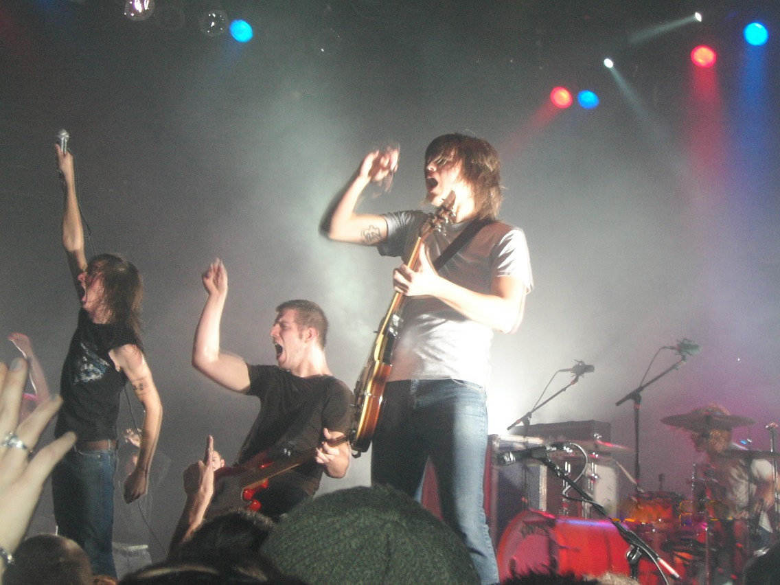 La banda Underoath en vivo